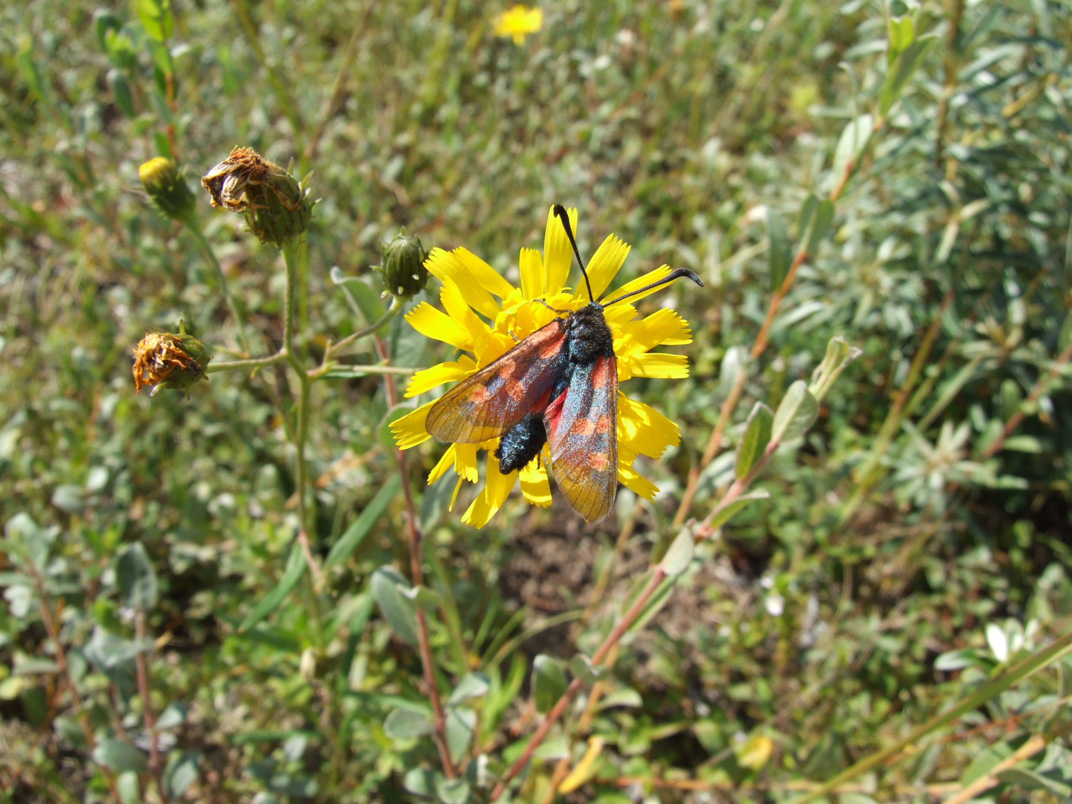 Hieracium umbellatum - Schirm-Habichtskraut -L'Epervière en ombelle - Schermhavikskruid - Hawkweed - Ort: Dune du Perroquet, Bray-Dunes, Frankreich - Blüte mit Besucher